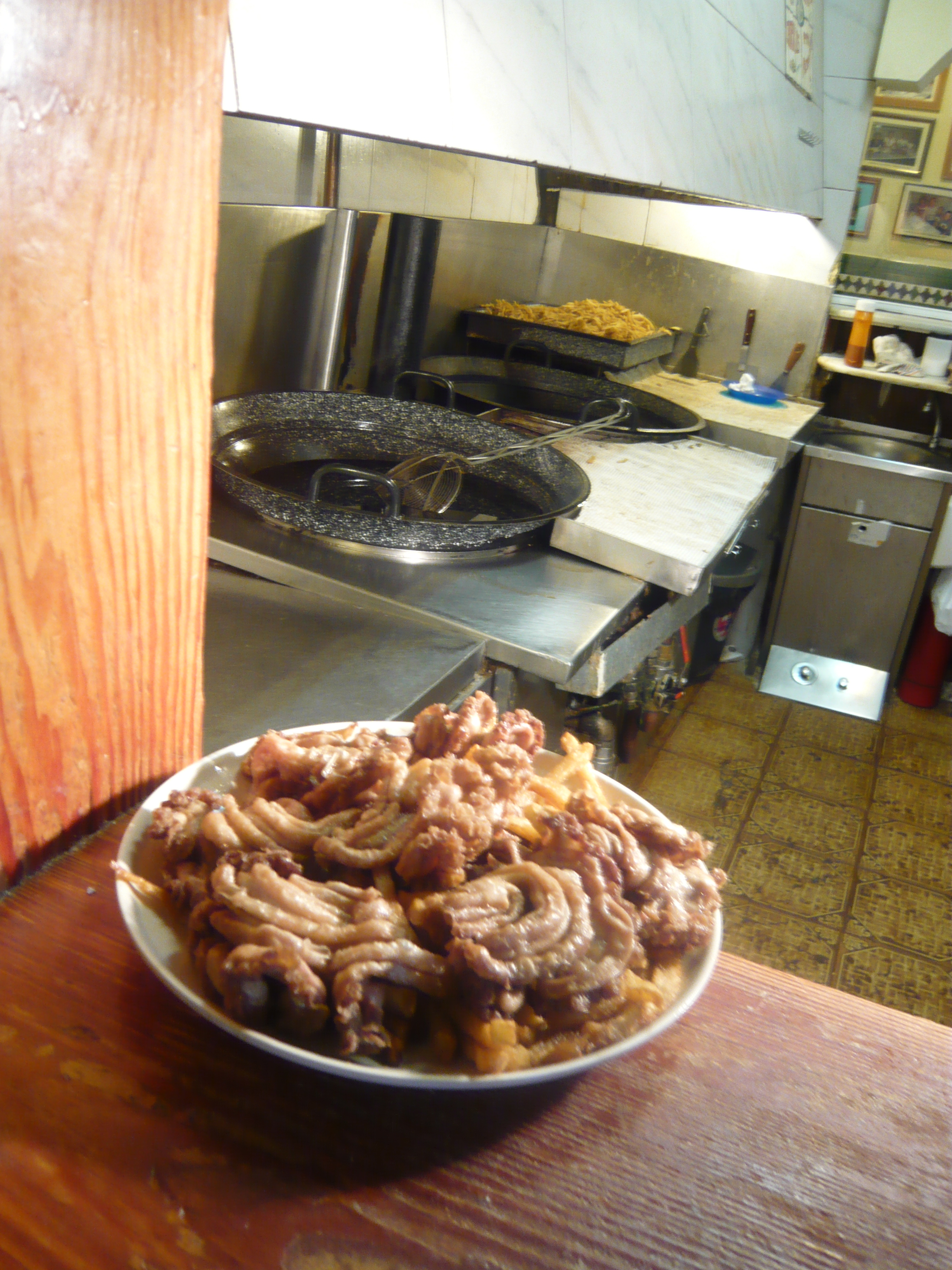 Plato de gallinejas con dos sartenes al fondo